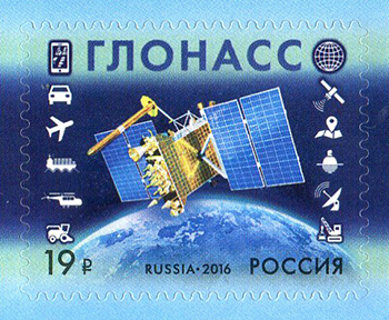 Почтовая марка России, выпущенная 5 июля 2016 года, посвящённая Российской космической навигационной системе ГЛОНАСС. Космический аппарат «ГЛОНАСС-К», знаки главных главных областей использования системы ГЛОНАСС. Номер по каталогу ЦФА — 2108. Художник — А. Поварихин. Тираж — 280000.